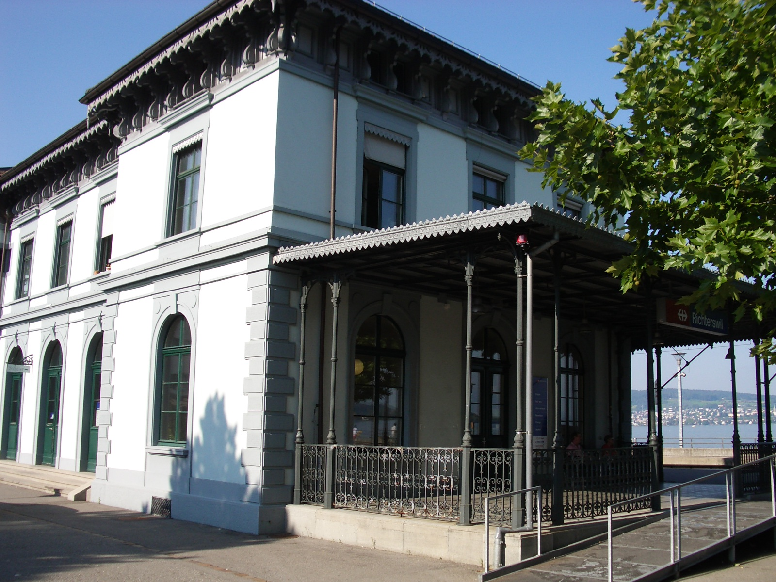 Railway Station Richterswil, Switzerland, "Brunel Award" Winner self-made, September 2005